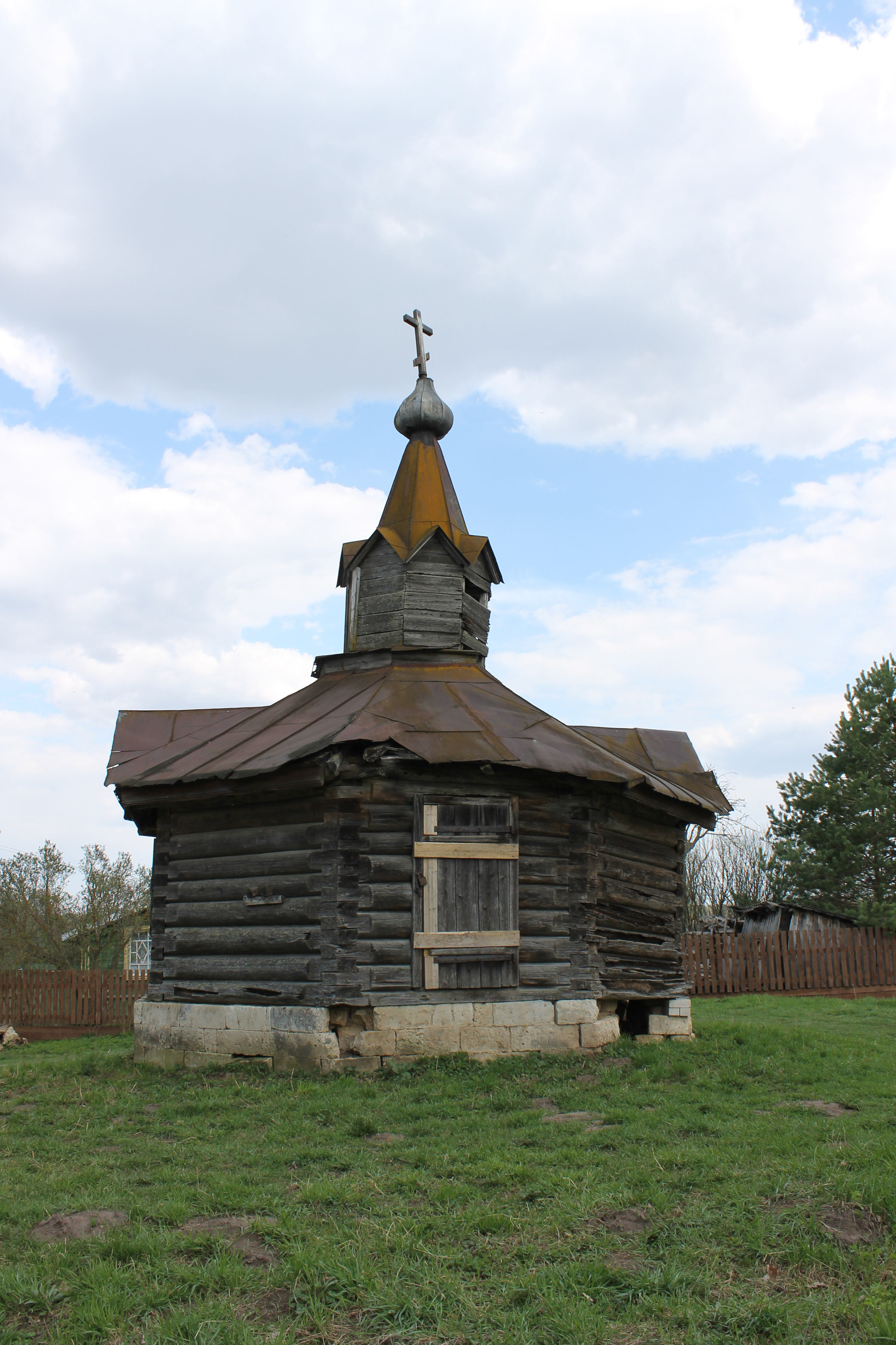 Ильинская часовня в с. Родня, Старицкий р-н Тверской области